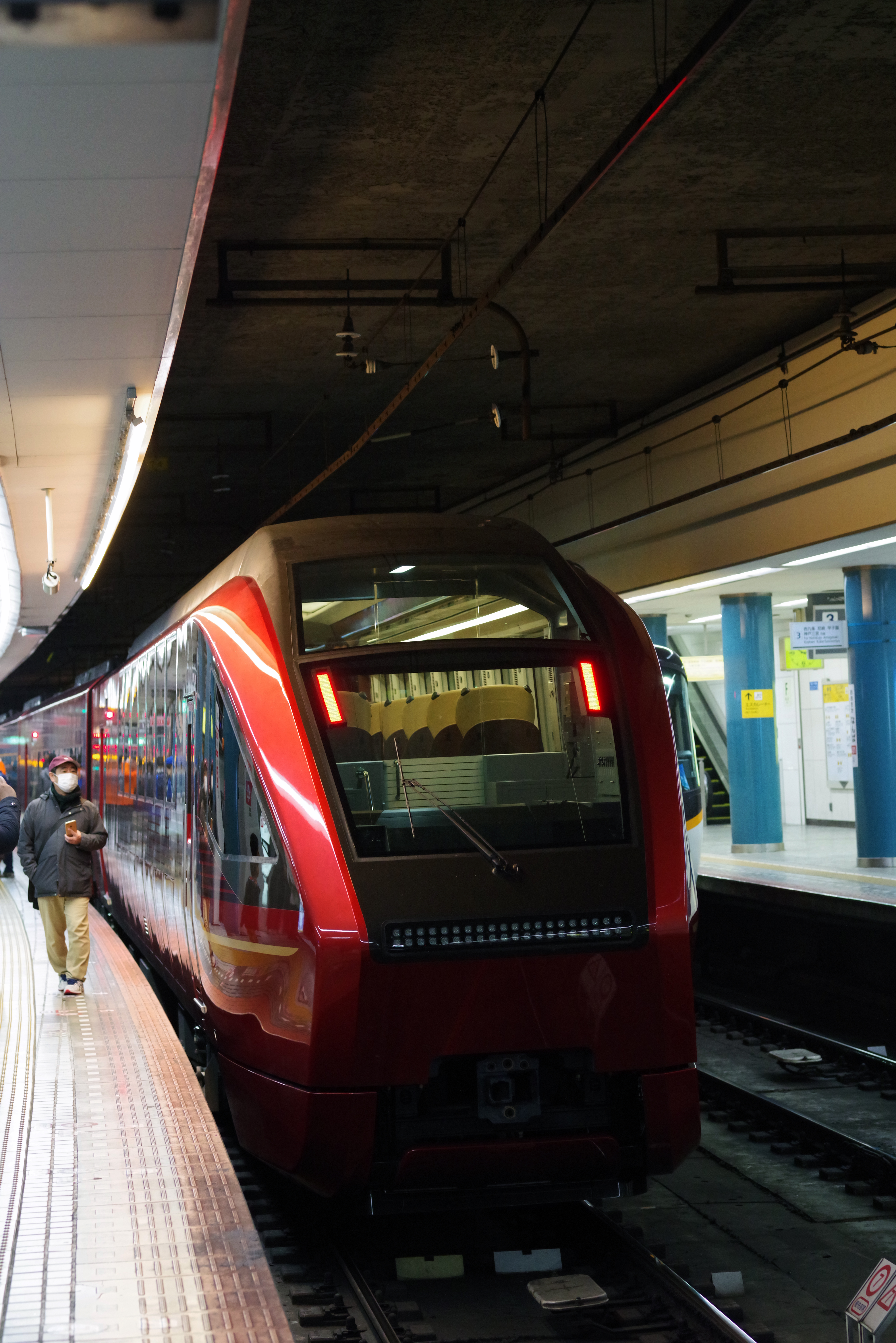 Kintetsu 80000 series "HINOTORI" 近鉄80000系